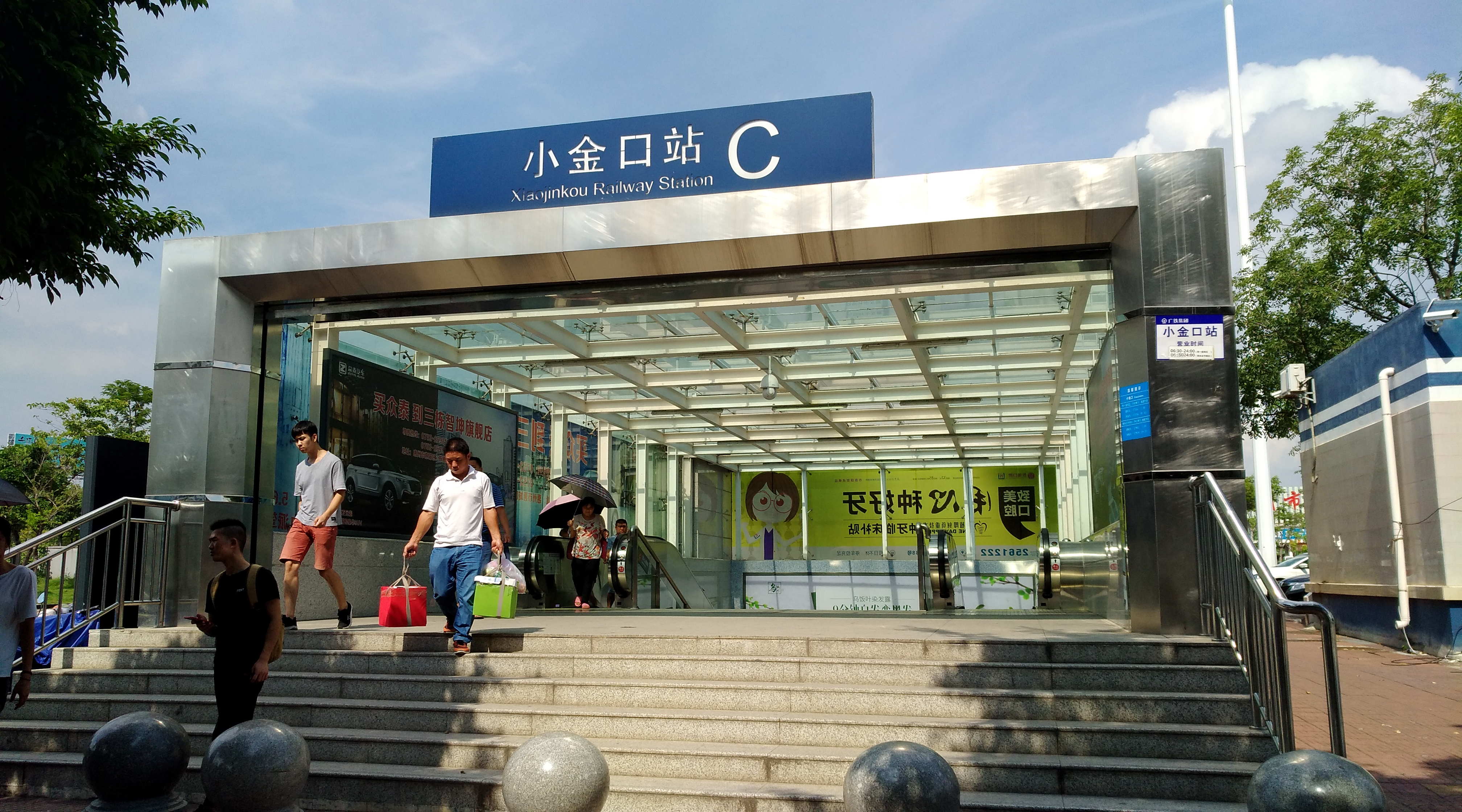 中国铁路 小金口站 C入口